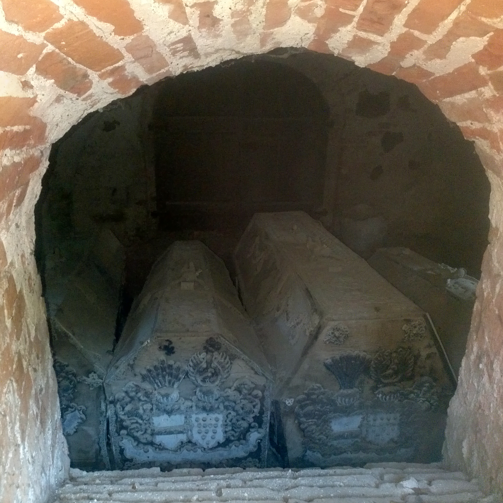 Gruft Dorfkirche Kirch Grambow (Mecklenburg-Vorpommern)